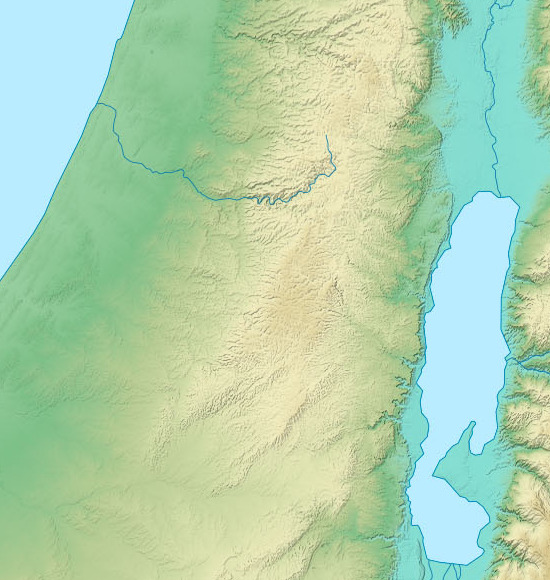 Relief de la Judée